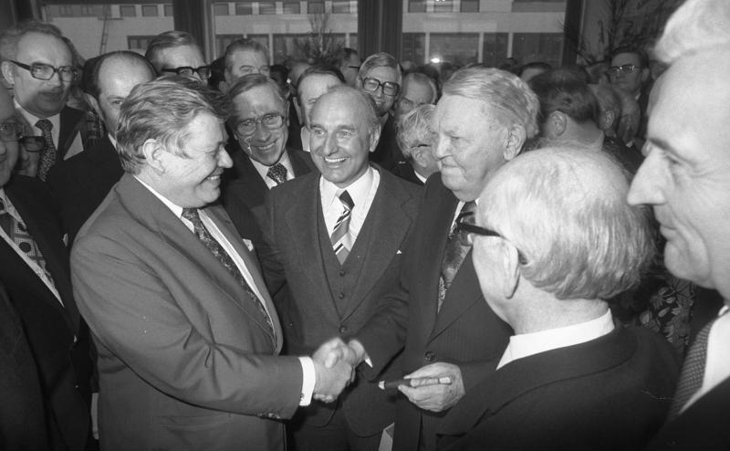 Empfang zum 50. Geburtstag des Präsidenten des Zentralverbandes des Deutschen Handwerks, Paul Schnitker im Haus des Deutschen Handwerk in Bonn.